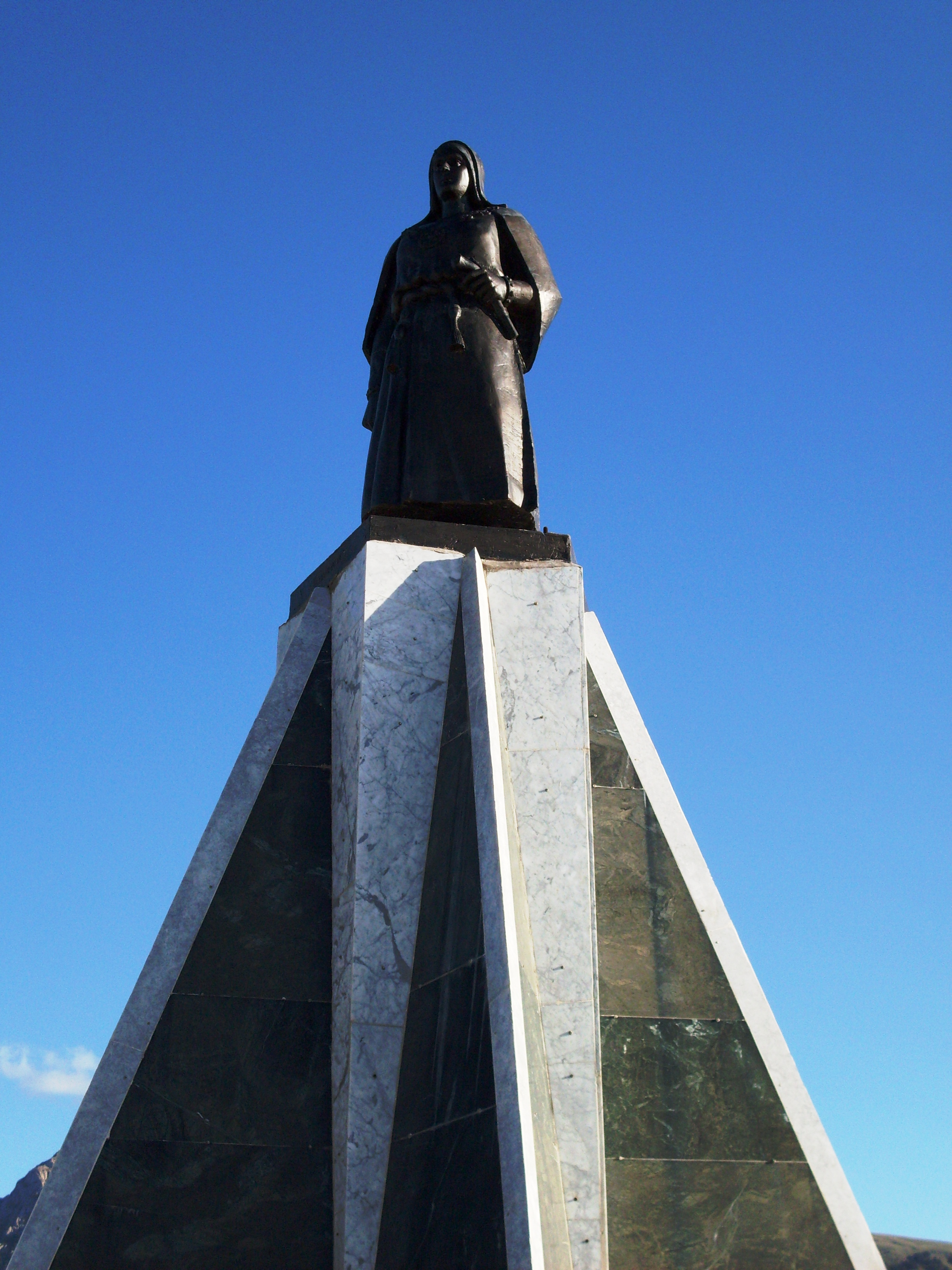 Statue de Fadma n Summer à Tizi-Ldjama At-Bu-Yusef (Tizi Ouzou, Algérie).